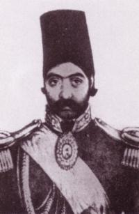 رضاقلی‌خان اردلان، حاکم کردستان، پسر خسروخان ناکام